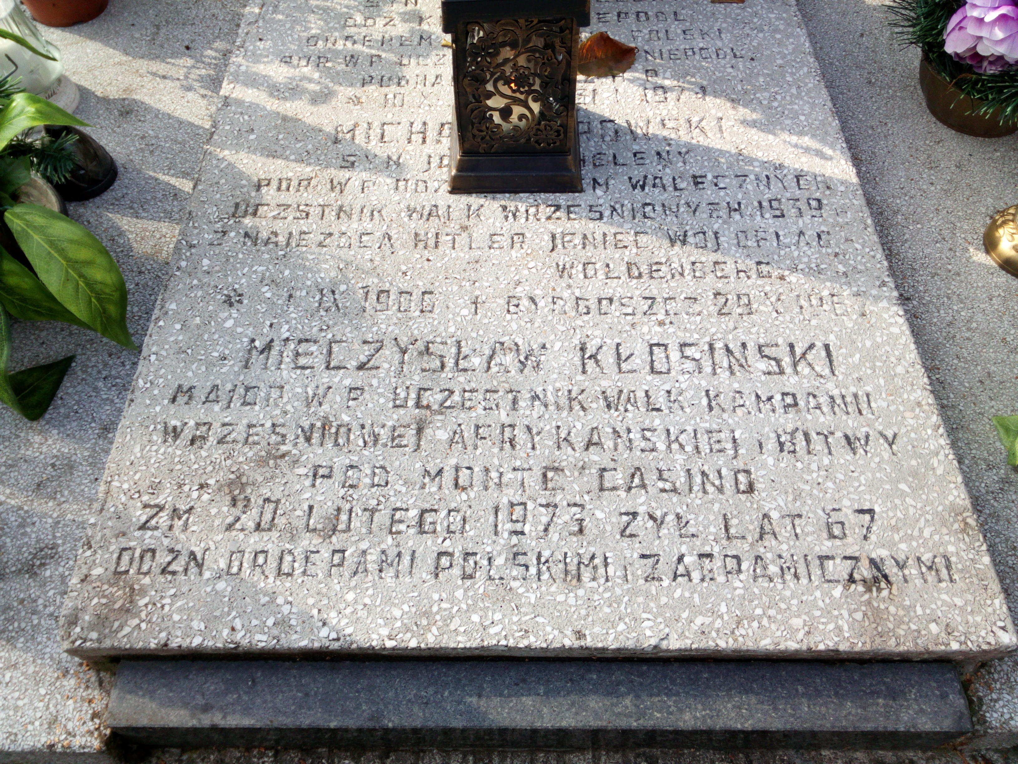 Napis na symbolicznej płycie nagrobnej.